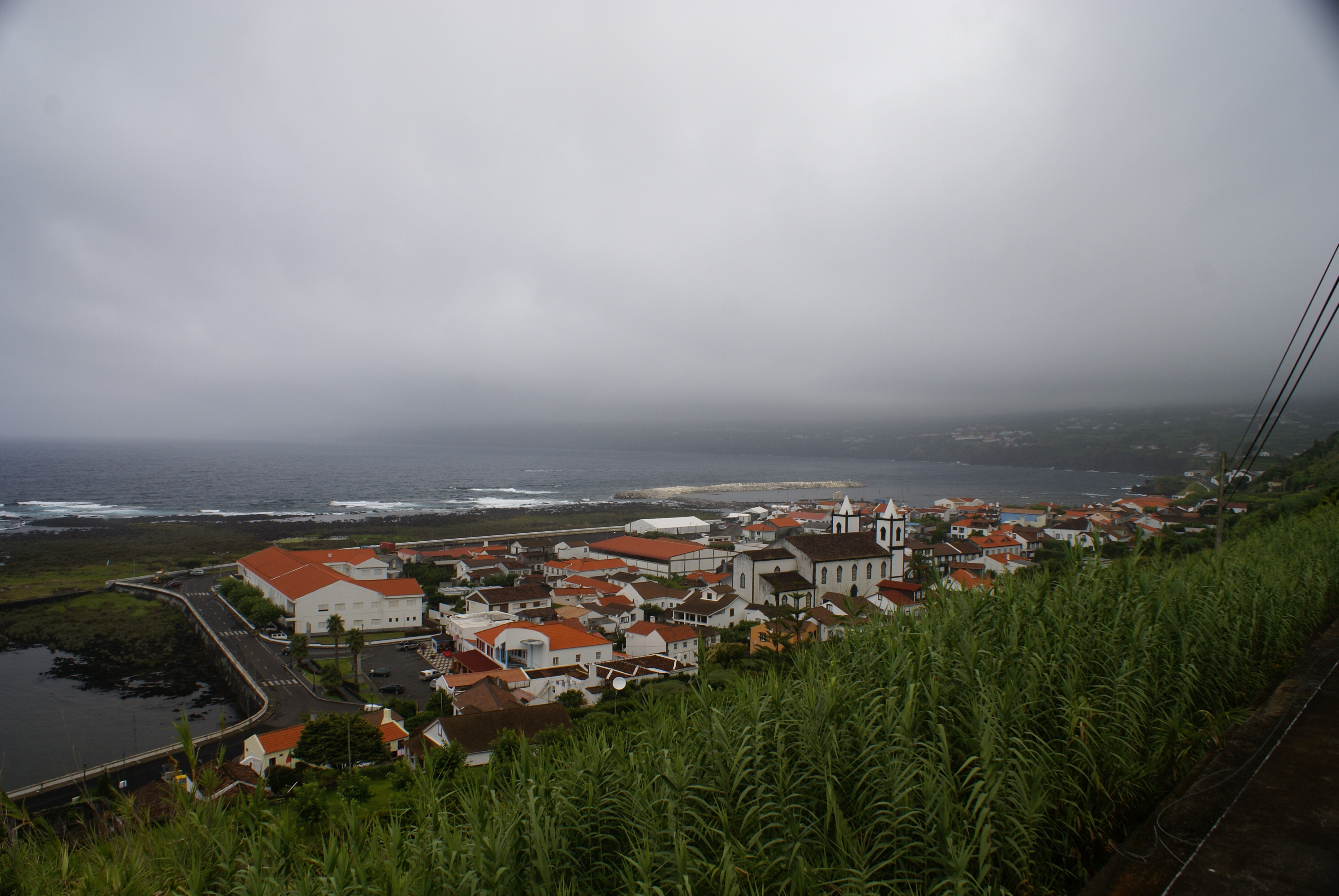 Lajes do Pico, vista parcial do casario, ilha do Pico, Açores, Portugal